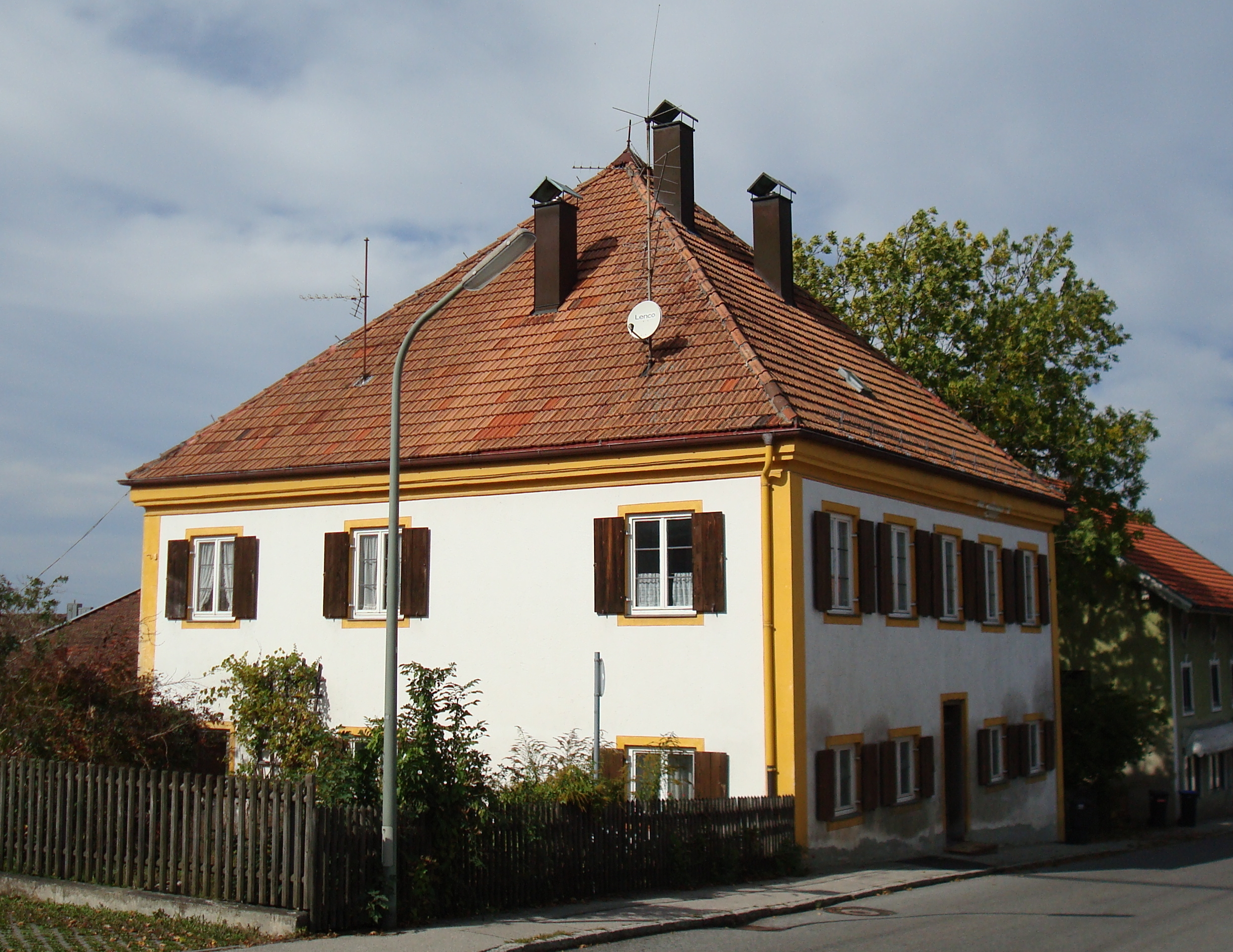 Seefeld, OT Oberalting, Drößlinger Straße 4. Das ehem. Drößlinger Pfarrhaus, ein zweigeschossiger barocker Zeltdachbau mit Traufgesims, stammt aus dem Jahre 1720. This is a photograph of an architectural monument.